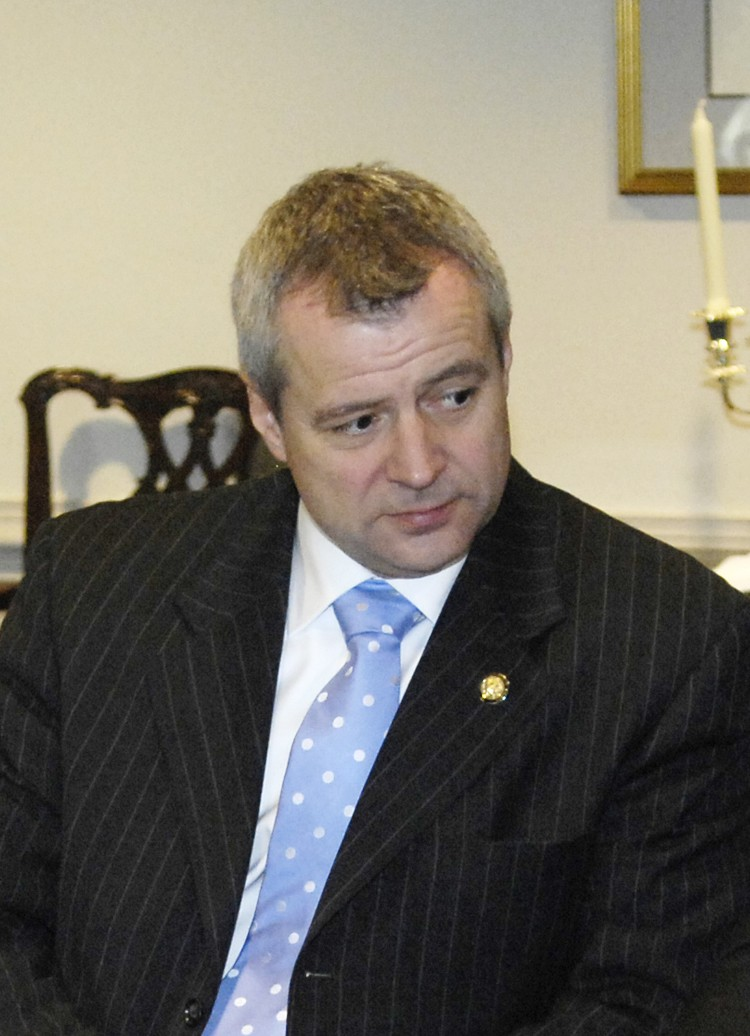 Petr Kolar